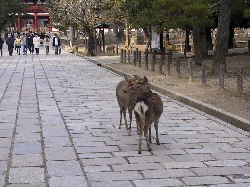 Deers in Nara, Japan